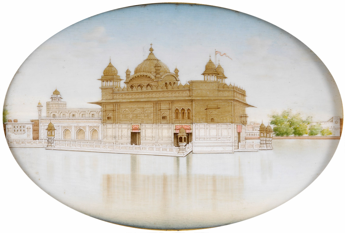 Der goldene Tempel in Amritsar. Miniatur, Indien 19. Jahrhundert. Gouache auf Elfenbein. Ca. 13 x 8,5 cm